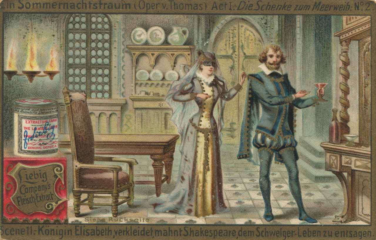 Act I. – Die Schenke zum Meerweib. No. 2 – Scene 11. – Königin Elisabeth, verkleidet, mahnt Shakespeare, dem Schwelger-Leben zu entsagen